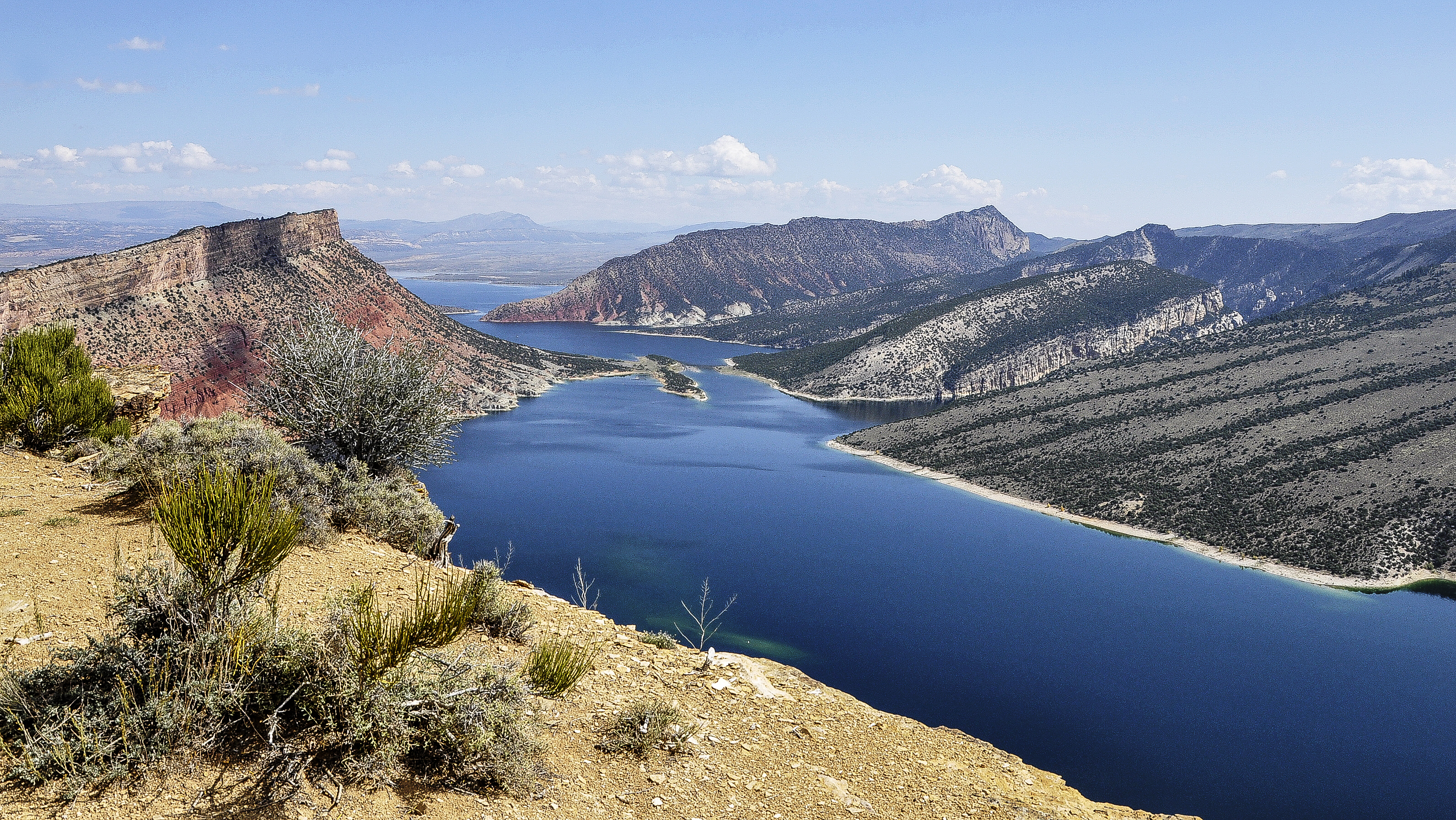 Flaming Gorge Reservoir - foto van het zuidelijk gelegen gedeelte in Utah, USA